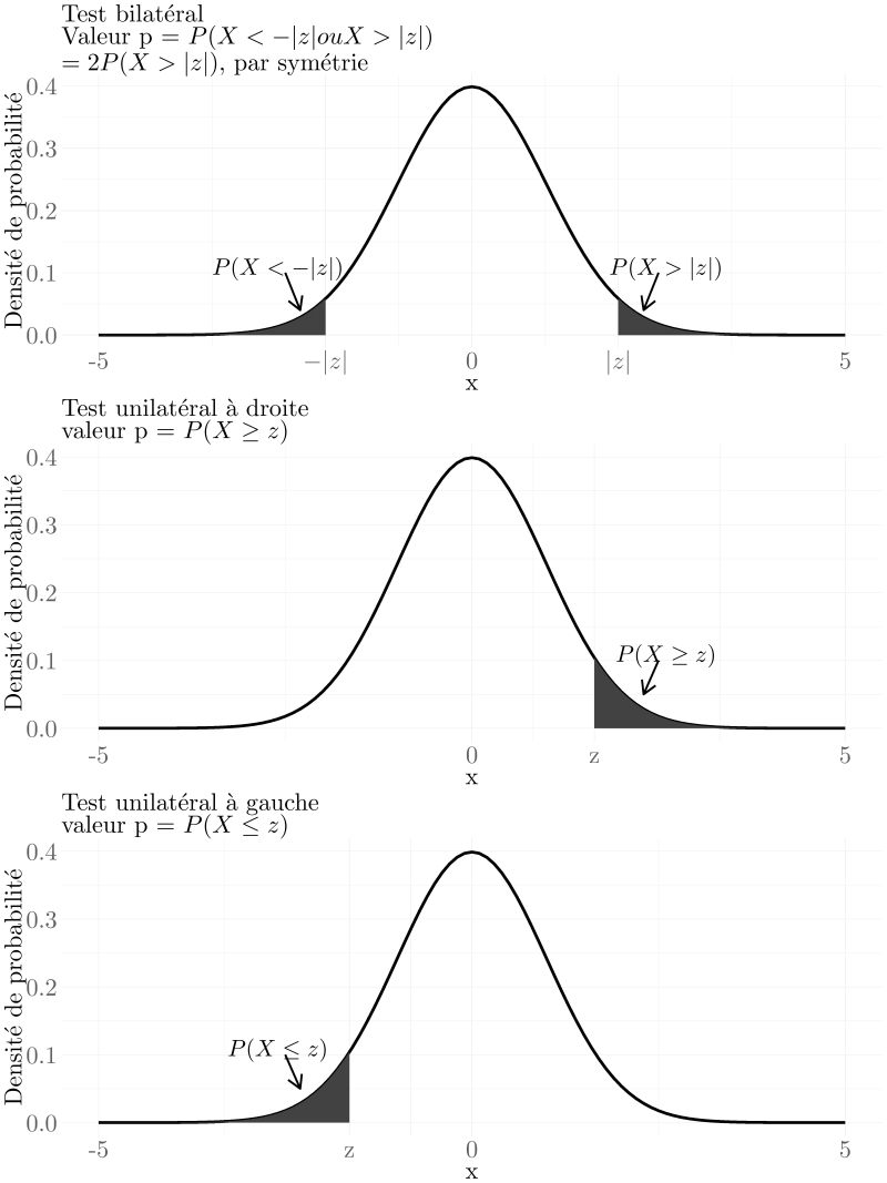 Illustration pour la page valeur p